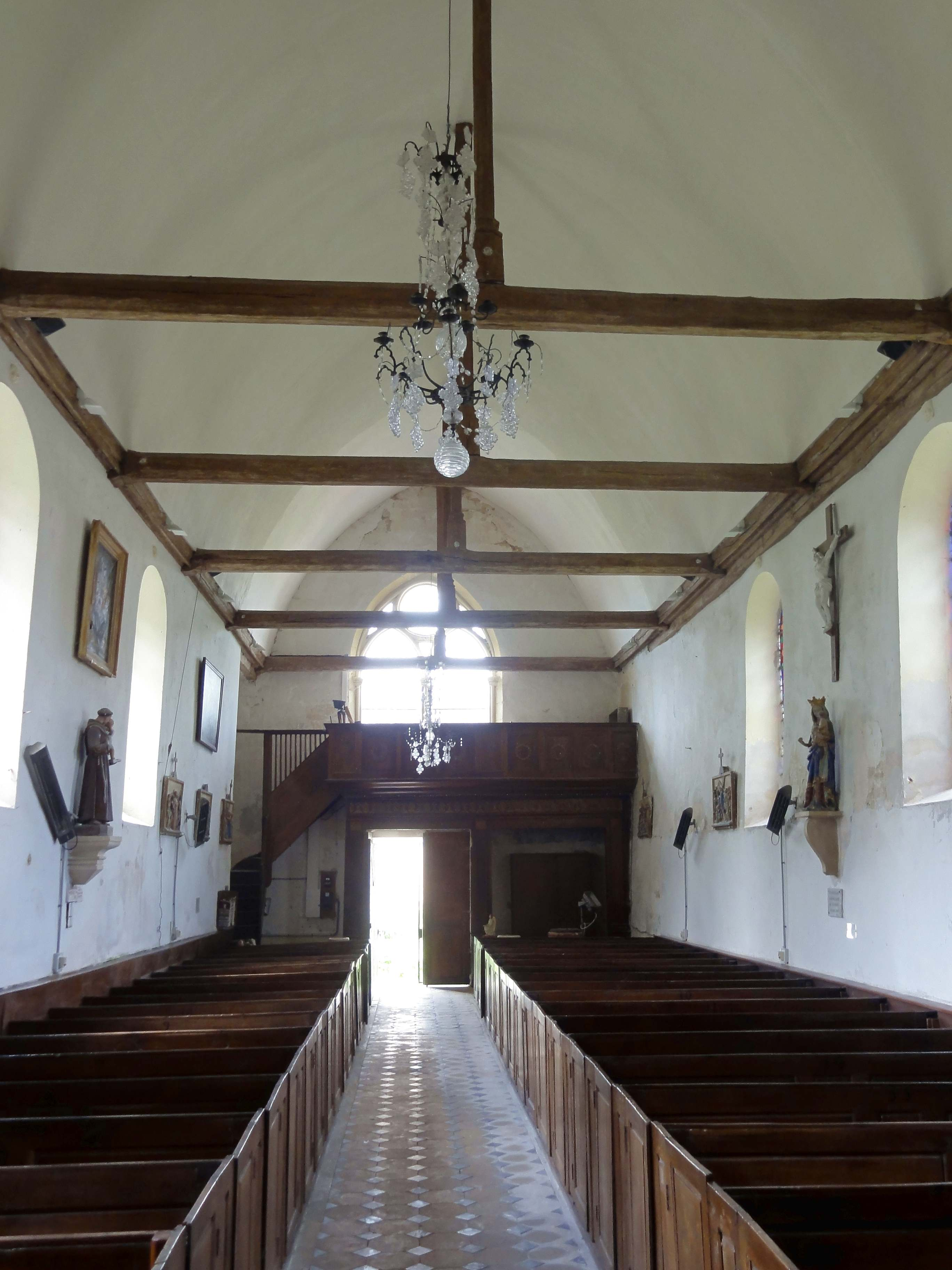 Intérieur de l'église - voir titre.